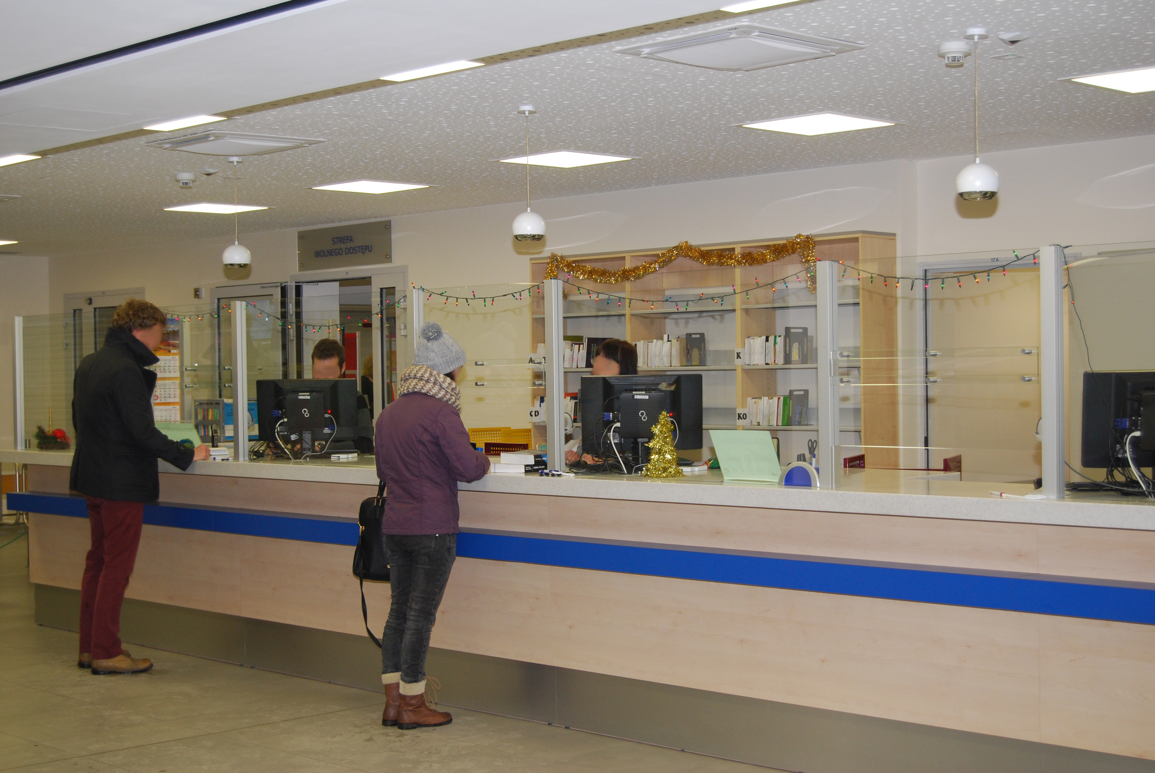 Wypożyczalnia BG AGH w Krakowie